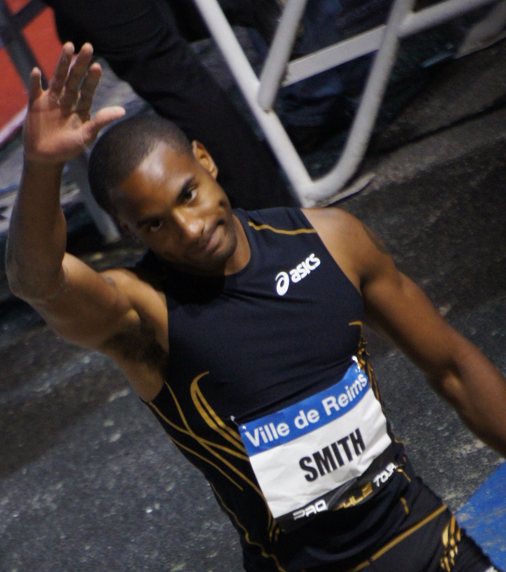 Le sauteur en longueur Tyrone Smith lors des Rencontres d'athlétisme de Reims 2013.